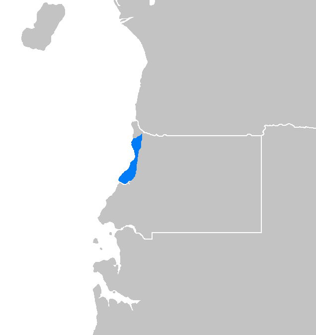 Idioma ngumbi